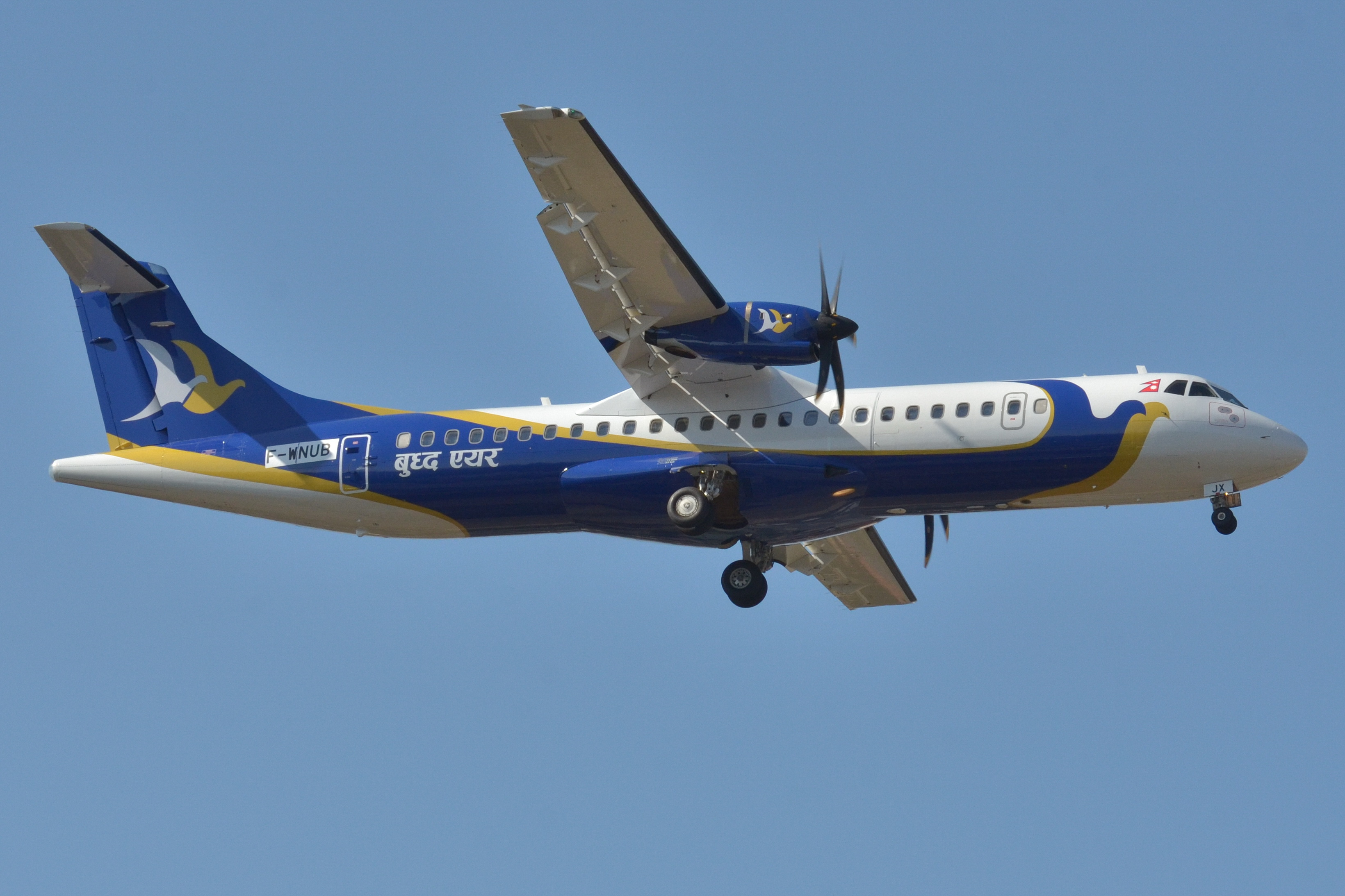 Photo prise à l'aéroport de Toulouse-Blagnac (LFBO) en France. Picture take at Toulouse-Blagnac Airport (LFBO) in France.